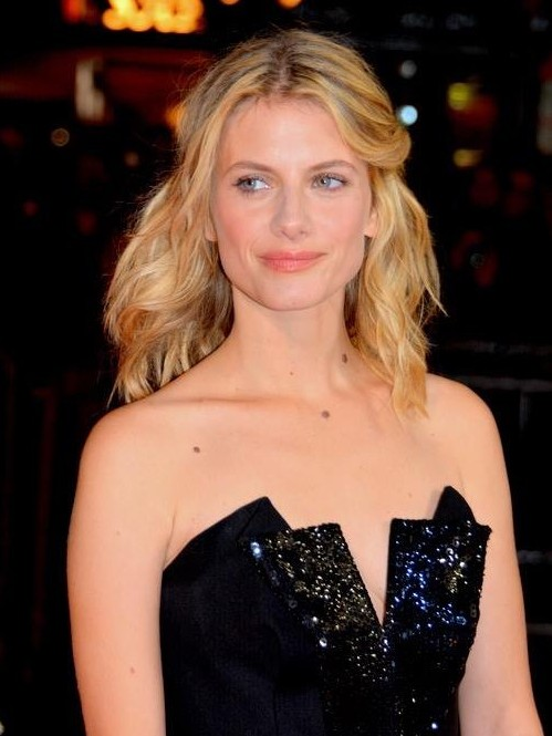 Mélanie Laurent à la cérémonie des César